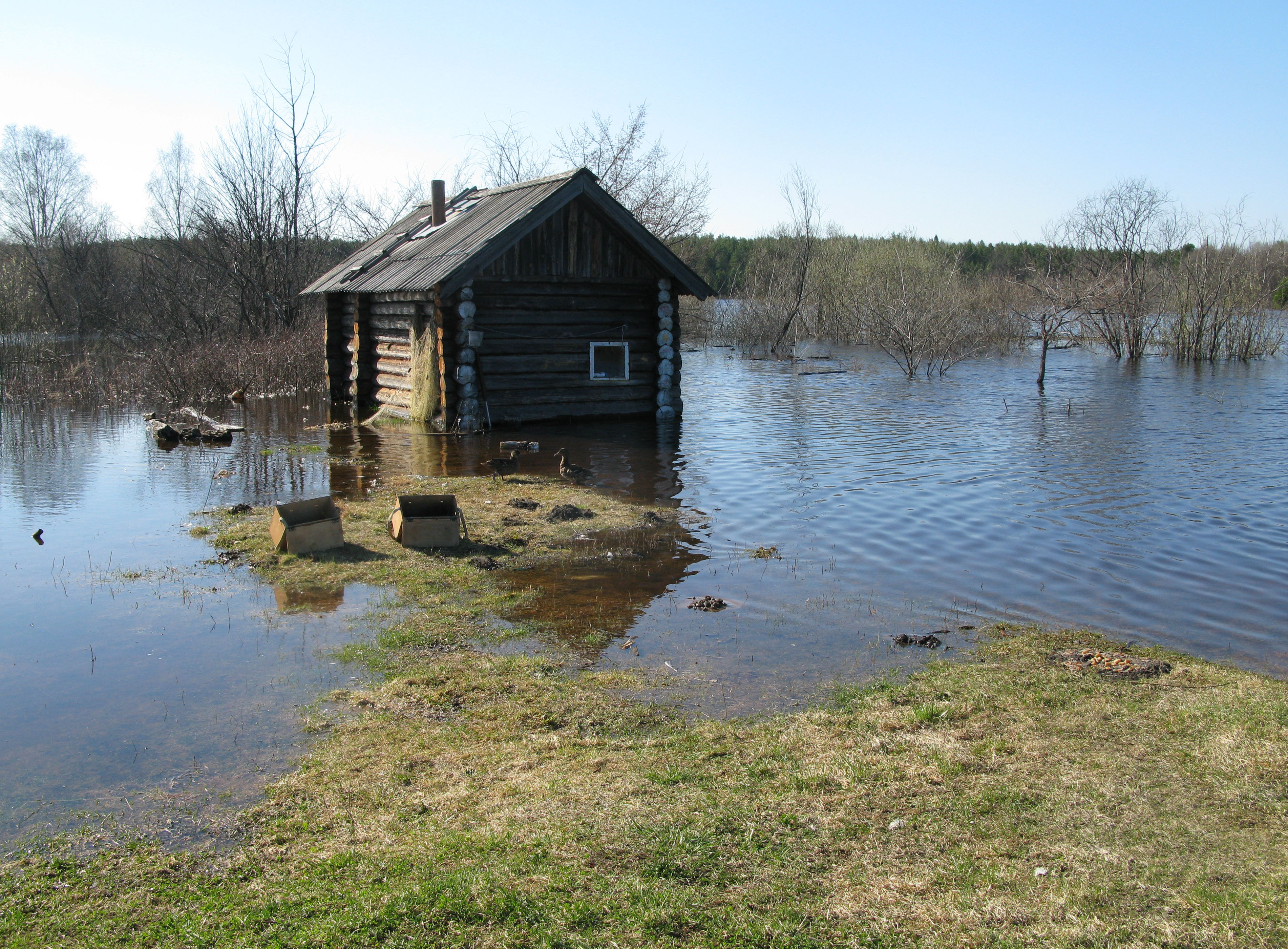 Место старого моста во время половодья